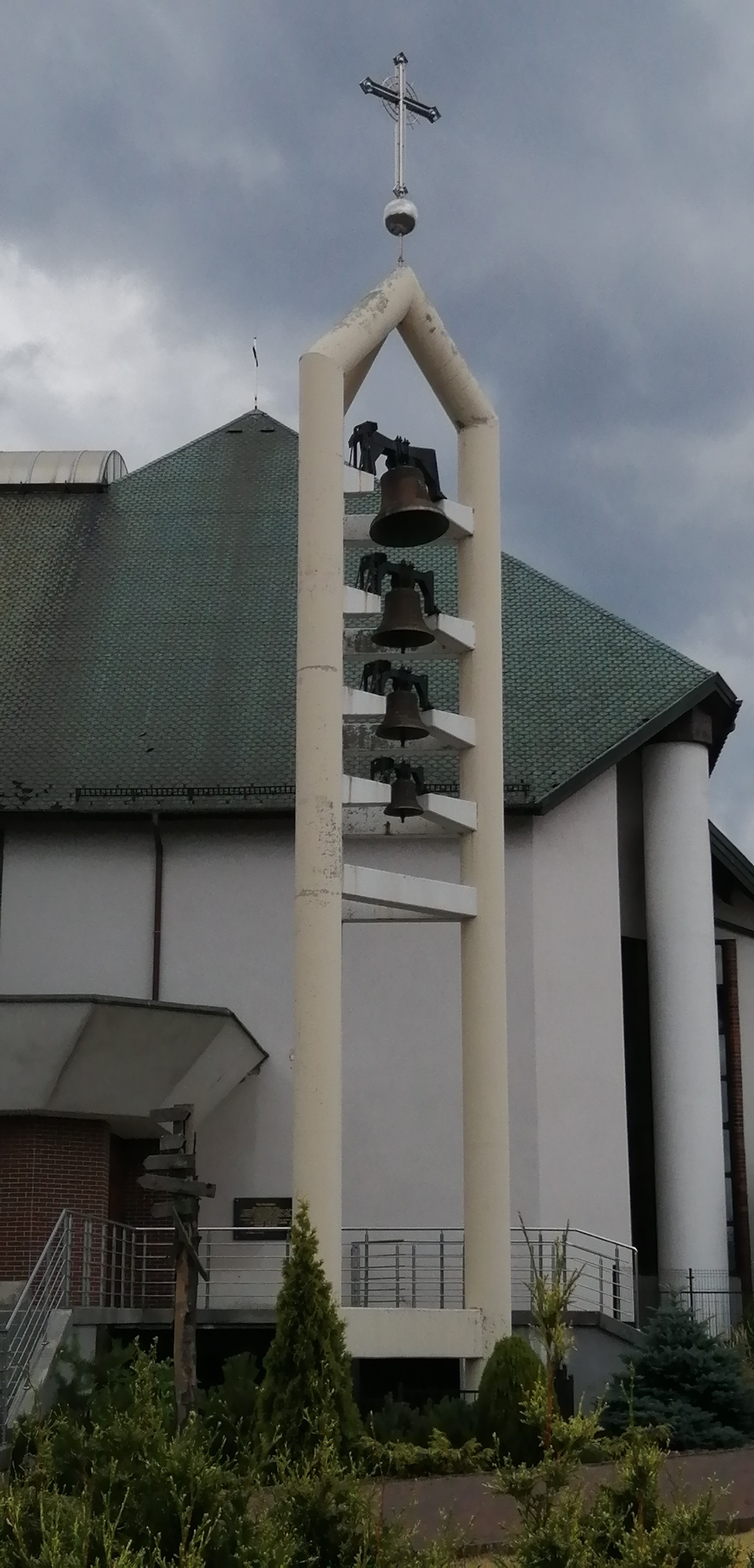 Kościół Matki Bożej Uzdrowienie Chorych w Tarnowskich Górach-Osadzie Jana. Dzwonnica